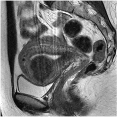 Ангиограмма, сделанная во время ЭМА по поводу миомы матки.